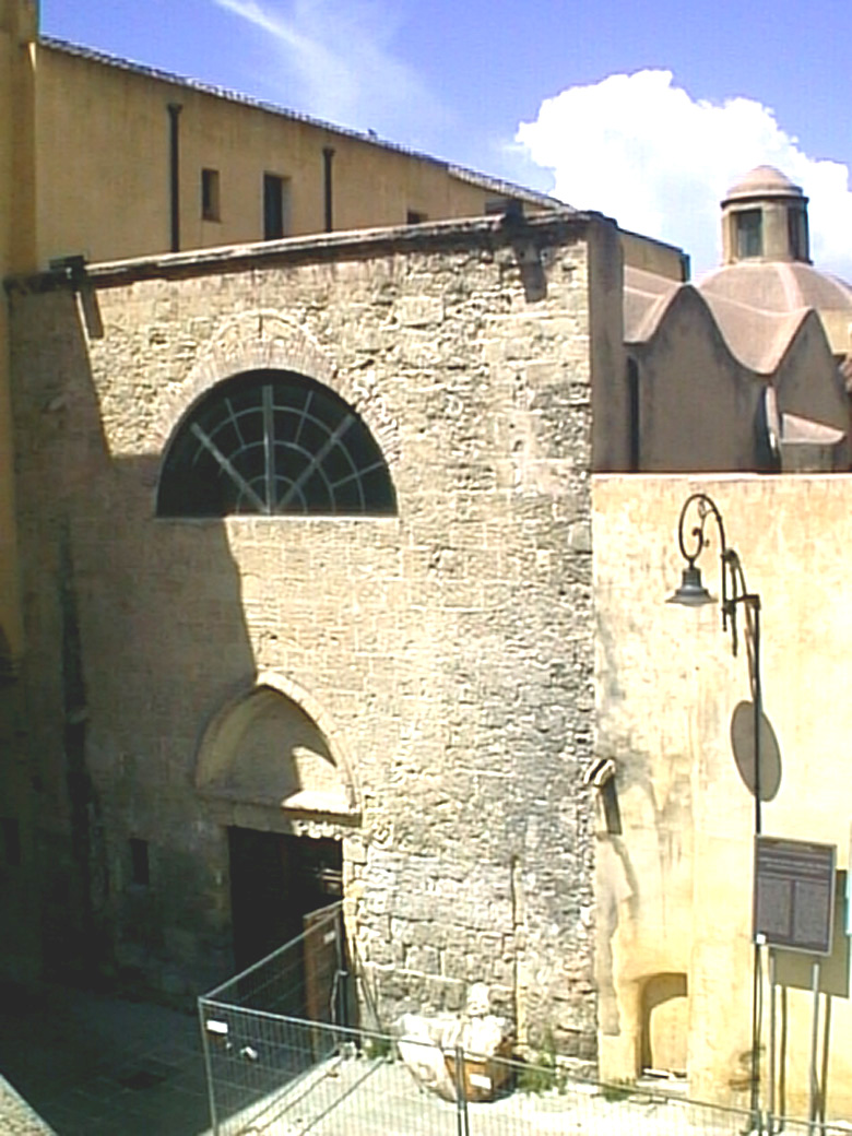 Facciata della Chiesa di Santa Maria del Monte, XVI secolo, Cagliari